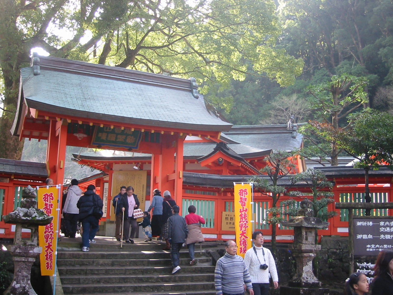 熊野那智大社で初詣